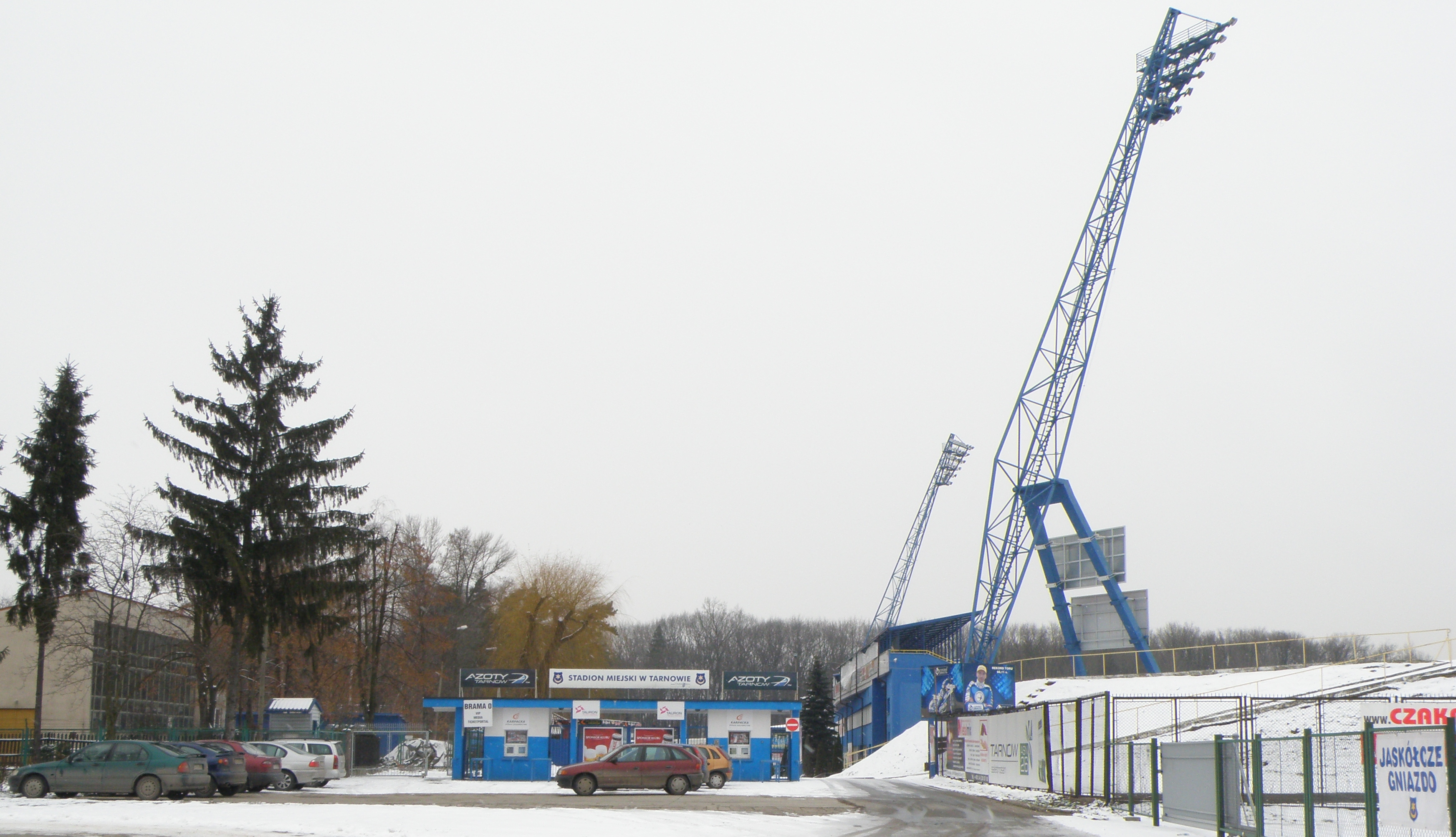 Stadion Miejski w Tarnowie w dzielnicy Mościce.